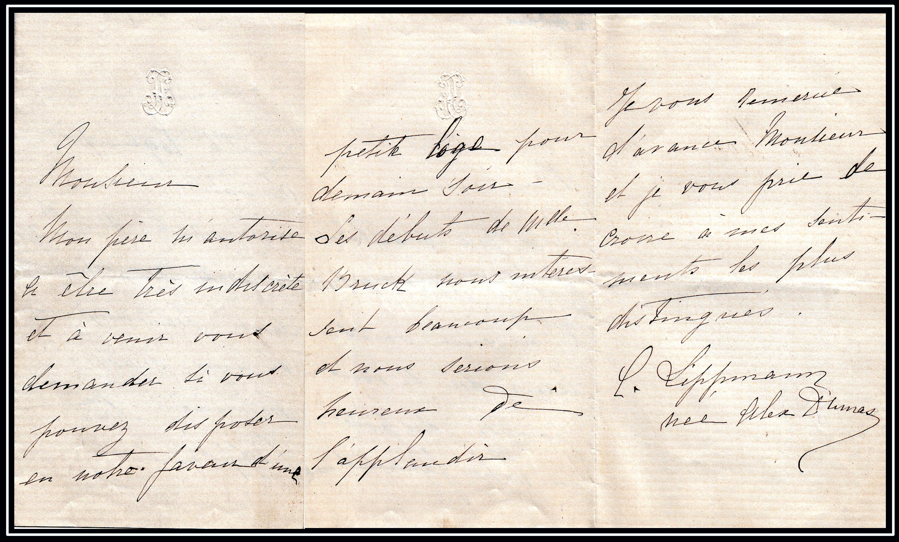 Письмо Колетт Дюма с просьбой предоставить ложе театра ей и ее отцу - Александру Дюма (сыну)